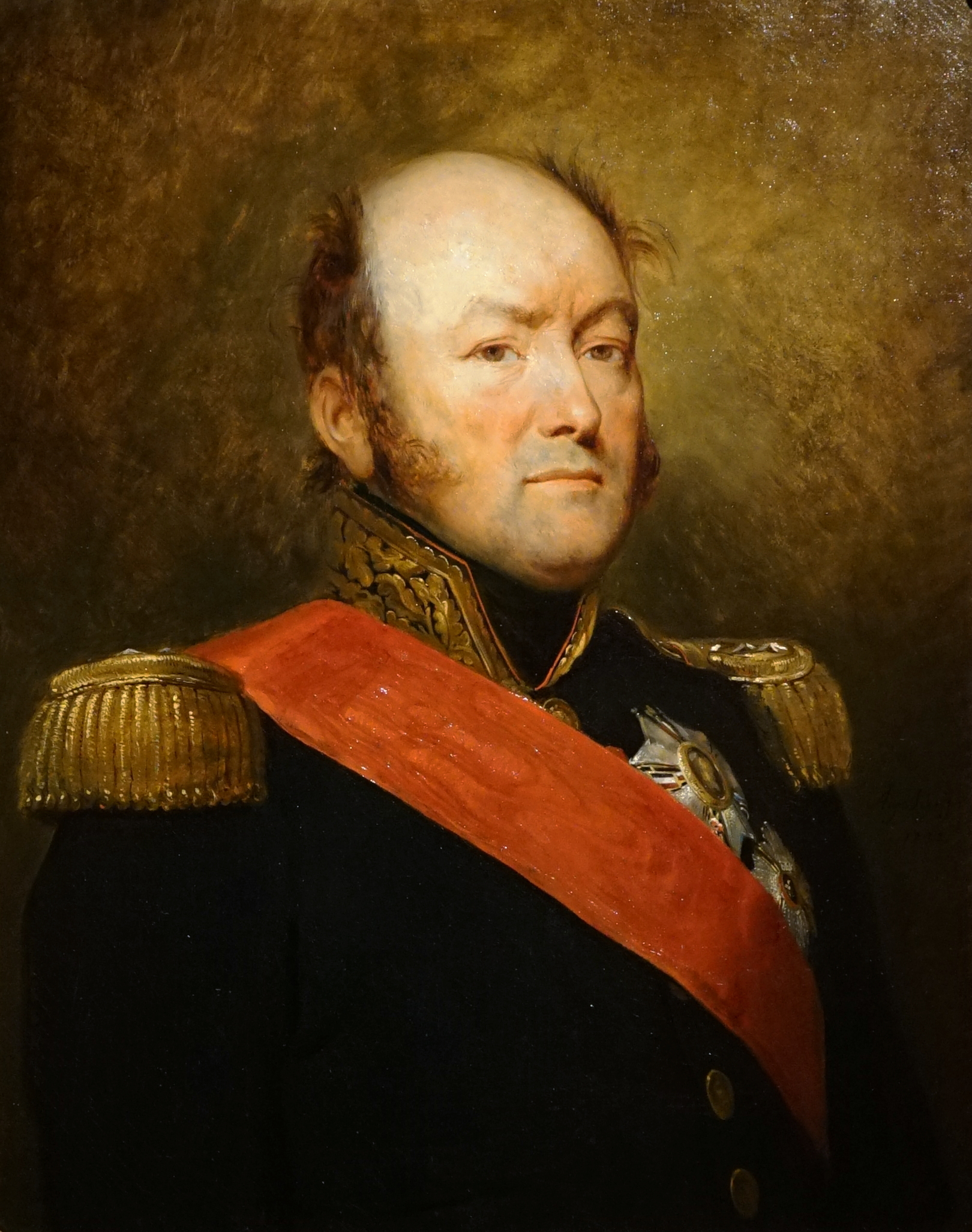 Jean-Baptiste Drouet, comte d'Erlon (1765-1844). Chef d'état-major du maréchal Lefebvre puis du maréchal Lannes, il participe à la soumission du Tyrol puis prend part à la guerre d'Espagne. Commandant en chef du 1er corps de l'armée du Nord pendant les Cent-Jours, il oscille entre les batailles de Ligny et des Quatre-Bras, le 16 juin 1815, sans participer à aucune. Le 18 juin, à Waterloo, il dirige l'attaque principale française contre la Haye-Sainte, mais ses troupes sont sévèrement repoussées par la cavalerie lourde britannique. Tombé en disgrâce sous la Restauration, il en est tiré par le roi Louis-Philippe en 1830, qui fait Drouet d'Erlon maréchal de France en 1843. Ce dernier s'éteint le 25 janvier 1844. H x L en cm sans cadre 73,5 x 59,6 ; huile sur toile.